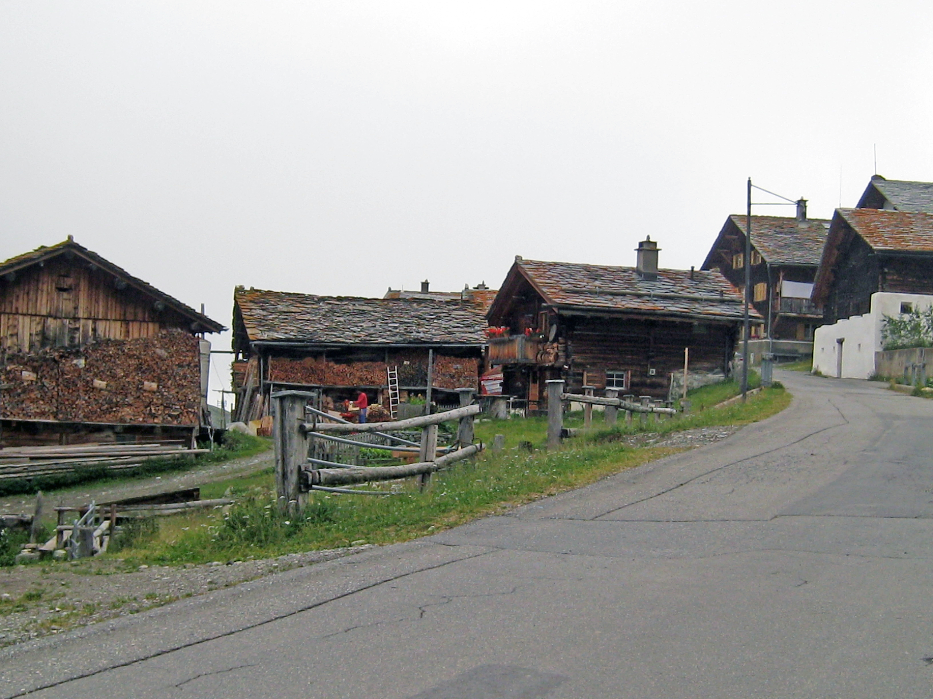 Juf, Schweiz